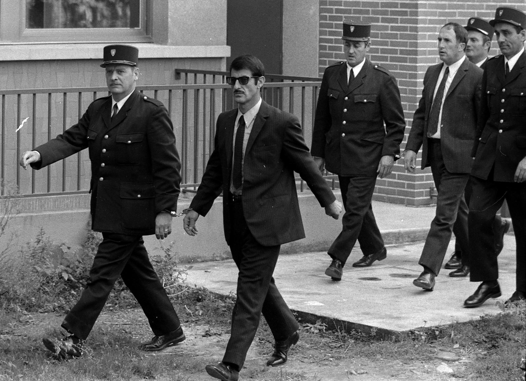 Palais de Justice. 4 octobre 1971. Vue d'ensemble de l'arrivée des accusés : vue de 3/4 face de René Vignal menotté à un policier ; derrière un autre accusé suit entouré de policiers. Cliché pris lors du procès de René Vignal (ancien footballeur), accusé d'une série de braquages perpétués à Toulouse et dans la région bordelaise entre 1969 et 1970. Observation: Au côté de René Vignal, comparaissaient également MM. Francis Bataille, Roger Claverie, Roger Martin, Marcel Filiol, Jean-Pierre Arrou, Guy Martin, René Doncel et Jean-Louis Parrenin.